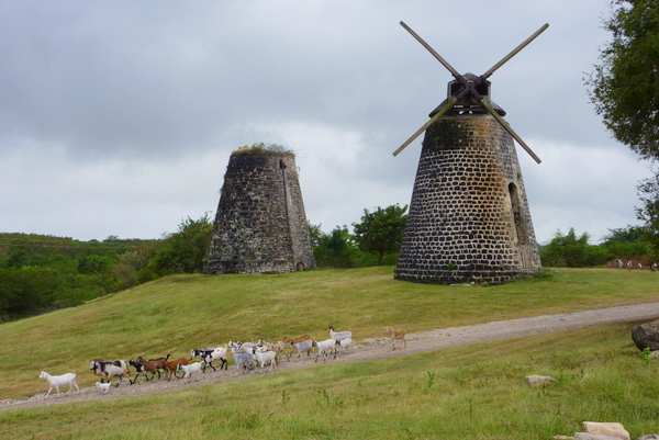 Bettys Hope auf Antigua